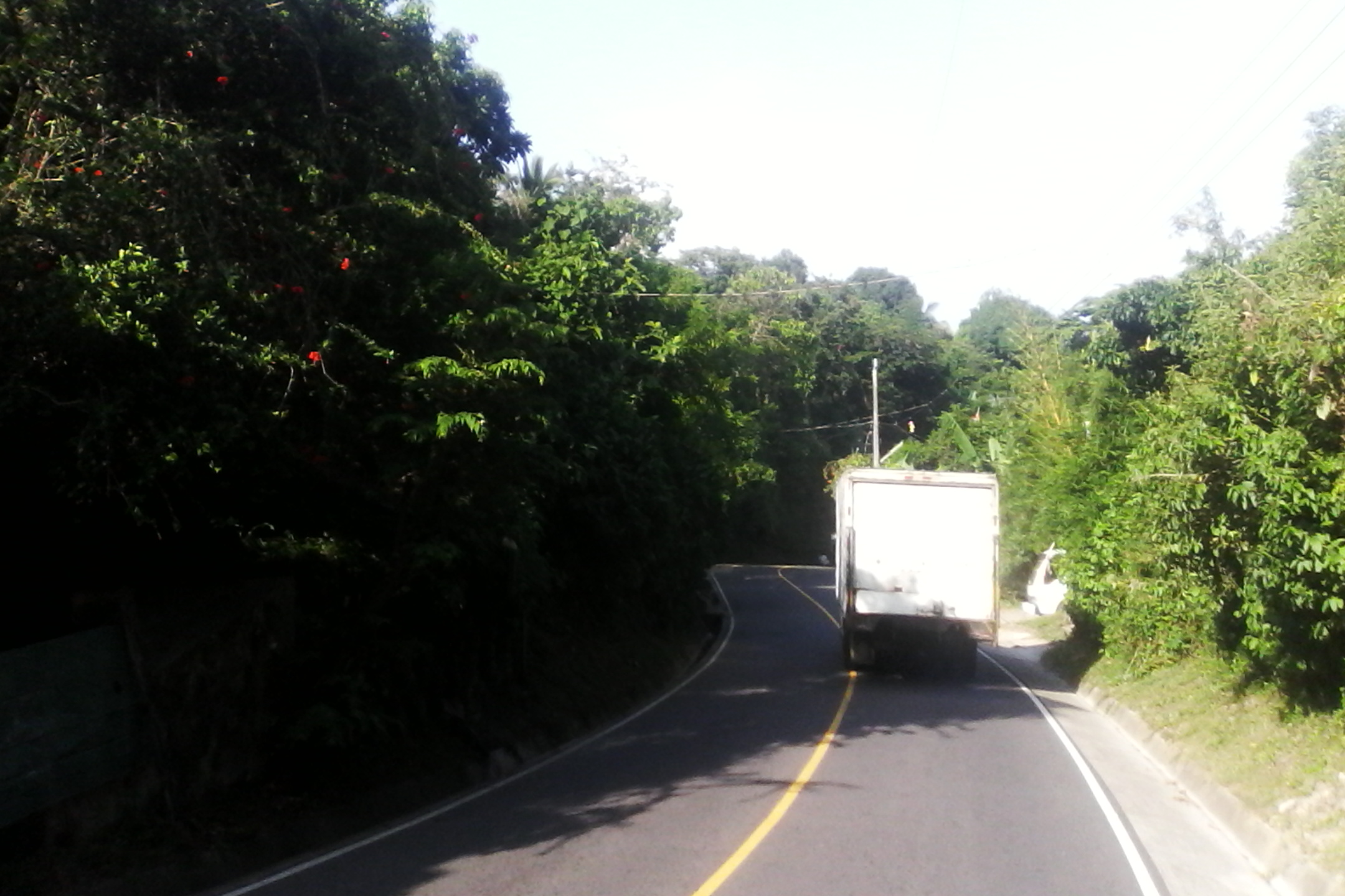 Santo Tomás, El Salvador